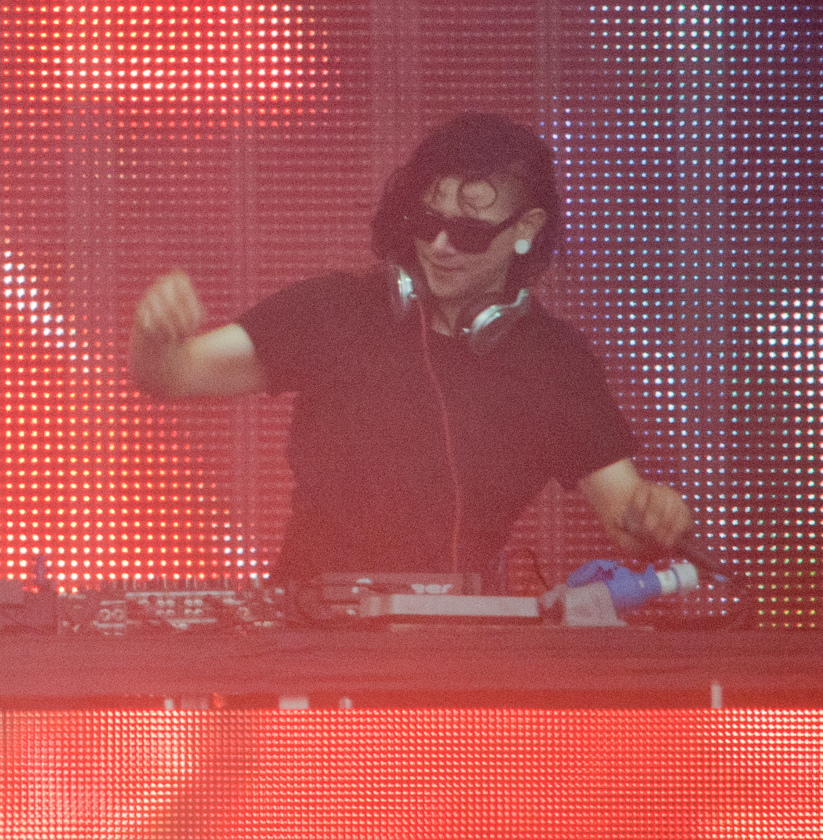 Skrillex